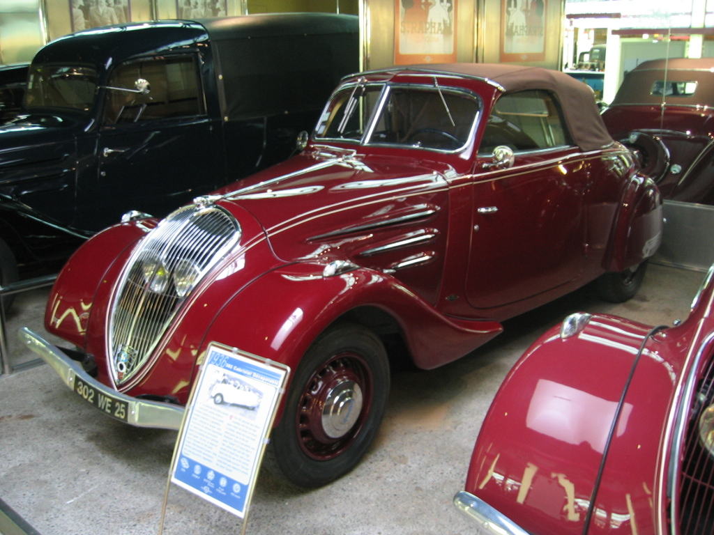 Peugeot 302 - Musée Peugeot Sochaux